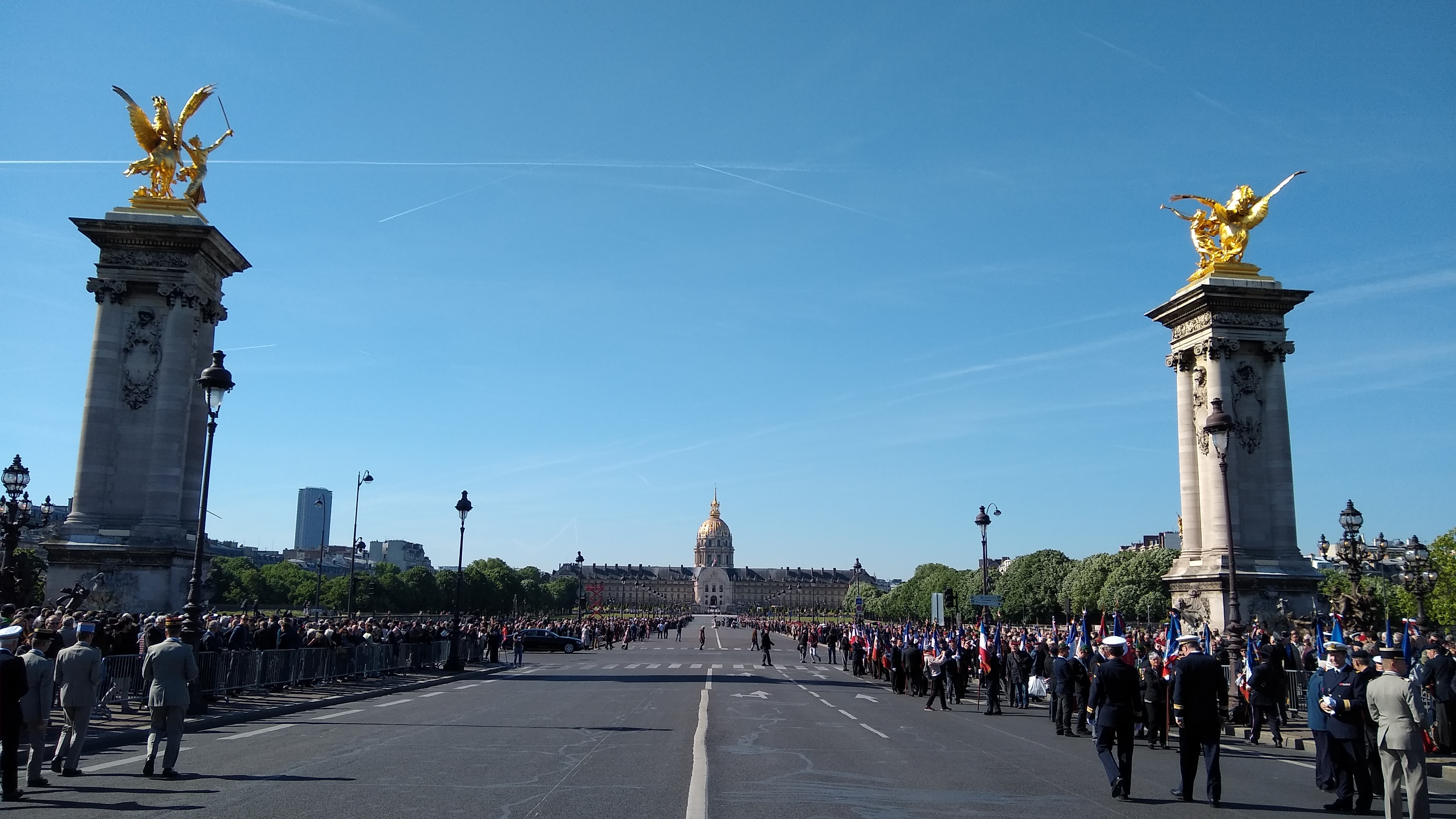 Hommage national le 14 mai 2019 aux deux militaires du commando Hubert tués en opération lors d'une action en vue de délivrer des otages.